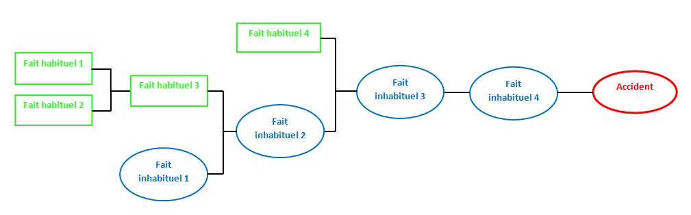 Présentation de l'allure générale d'un arbre des causes avec le code graphique